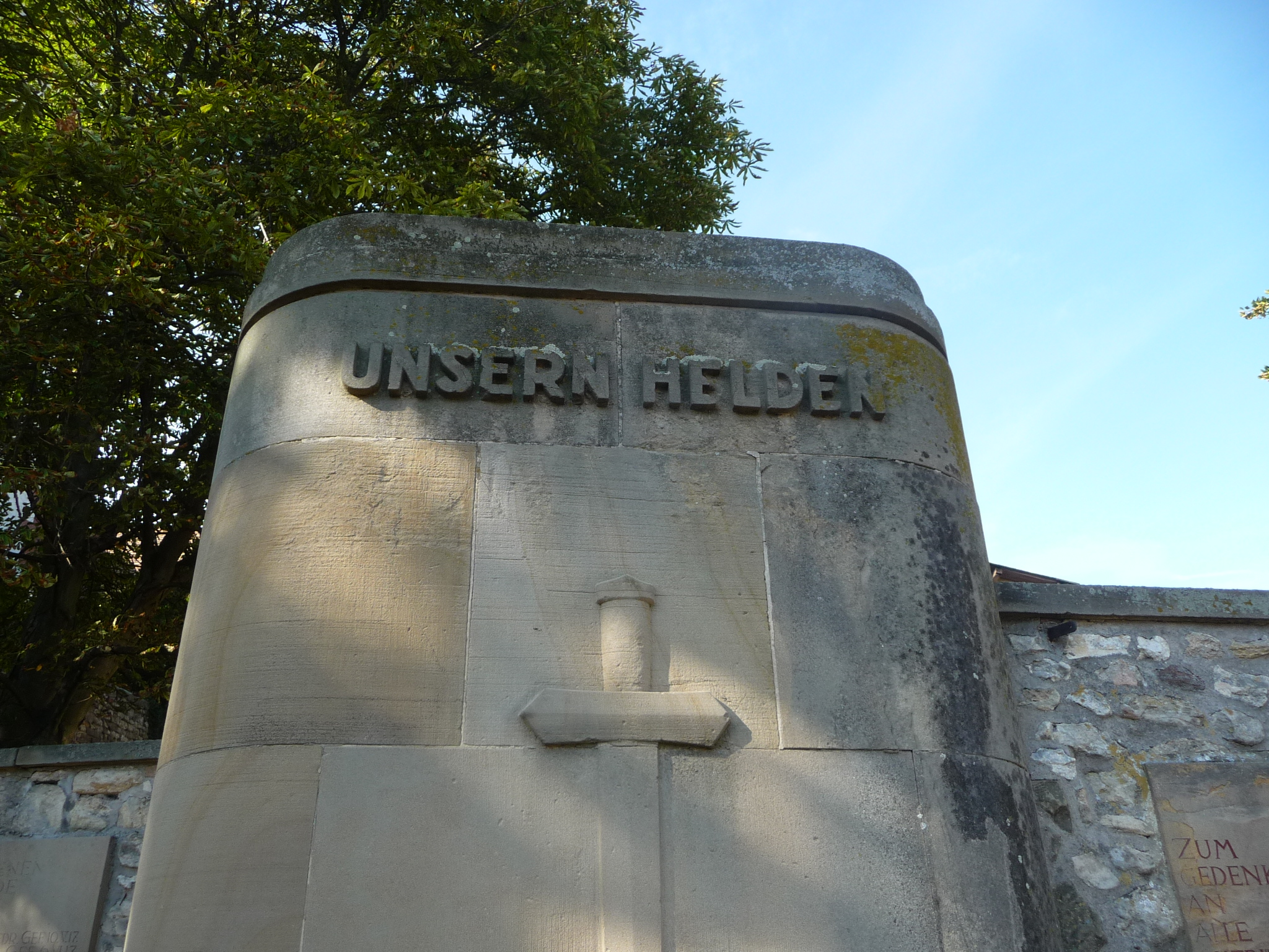 Bockenheim an der Weinstraße